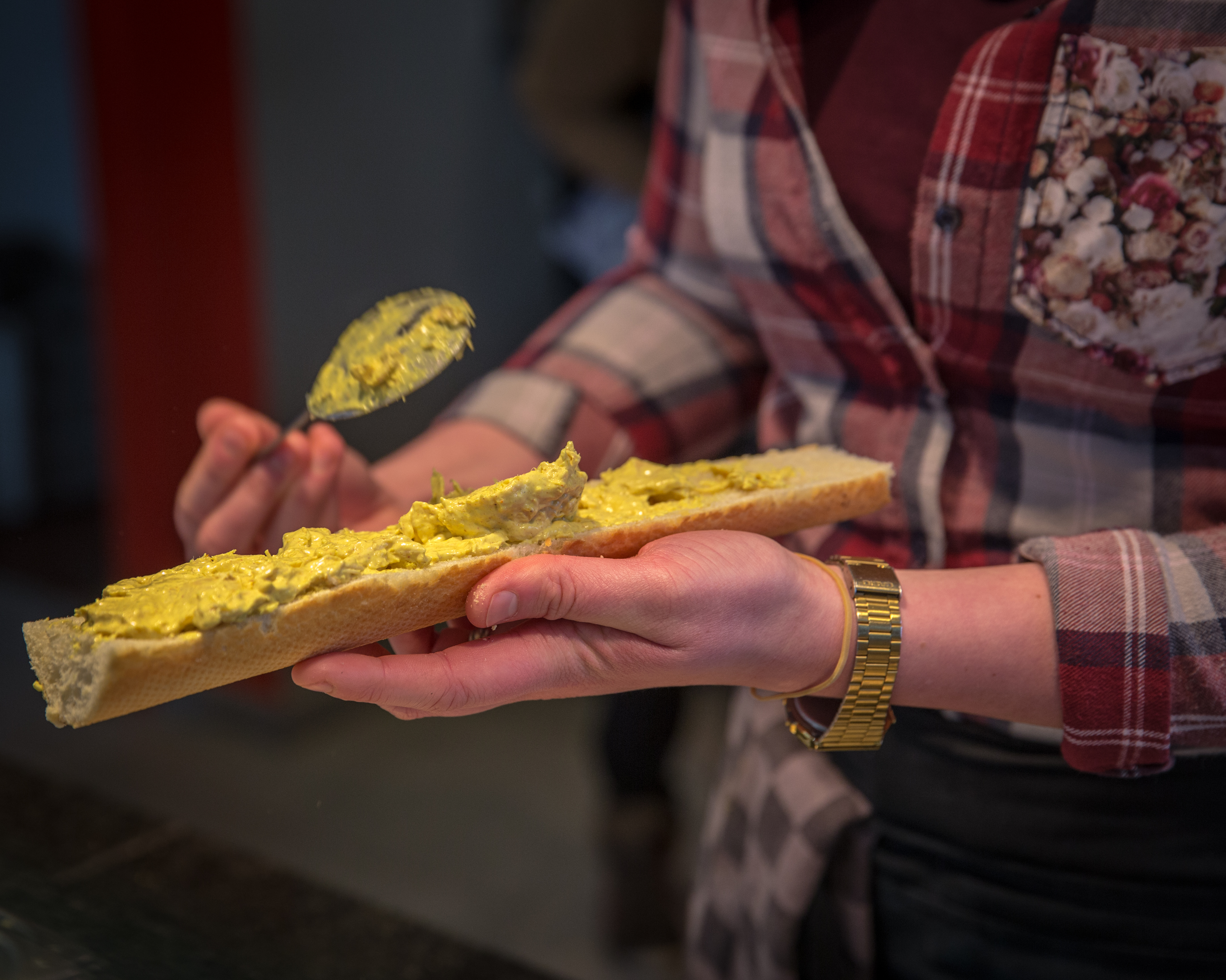 Dame van broodjeszaak in Turnhout smeert een broodje kip curry.